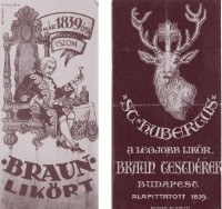 Liqueur from XIX century